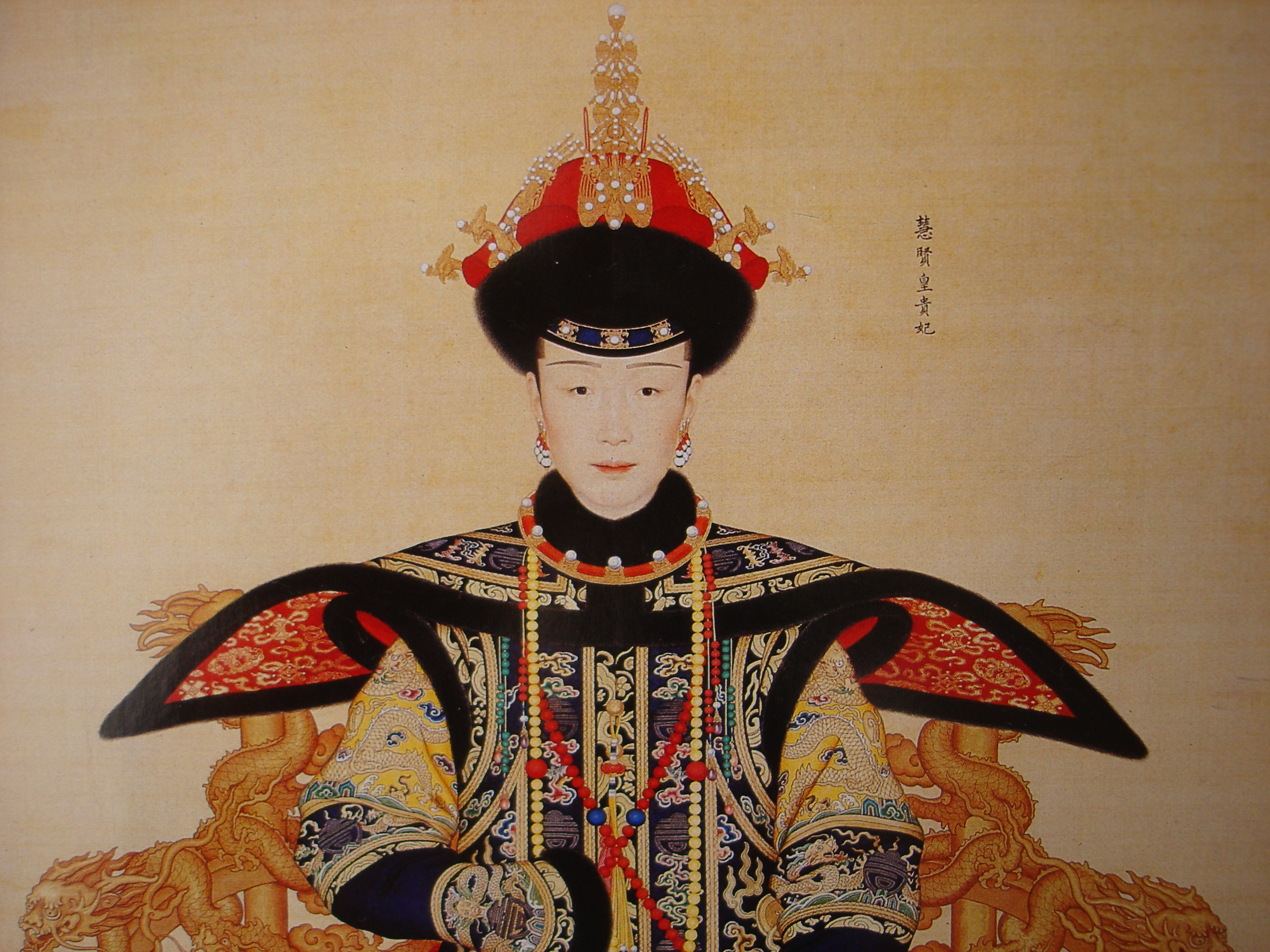 Schilderij van een bijvrouw van de Keizer Qianlong die leefde van 1711 - 1799.